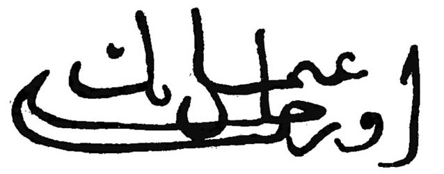 "Orhân bin 'Osmân Beg", 754-1353 târihli Akpınar Çiftliği Mülk-nâmesi'nden ayrıntı.